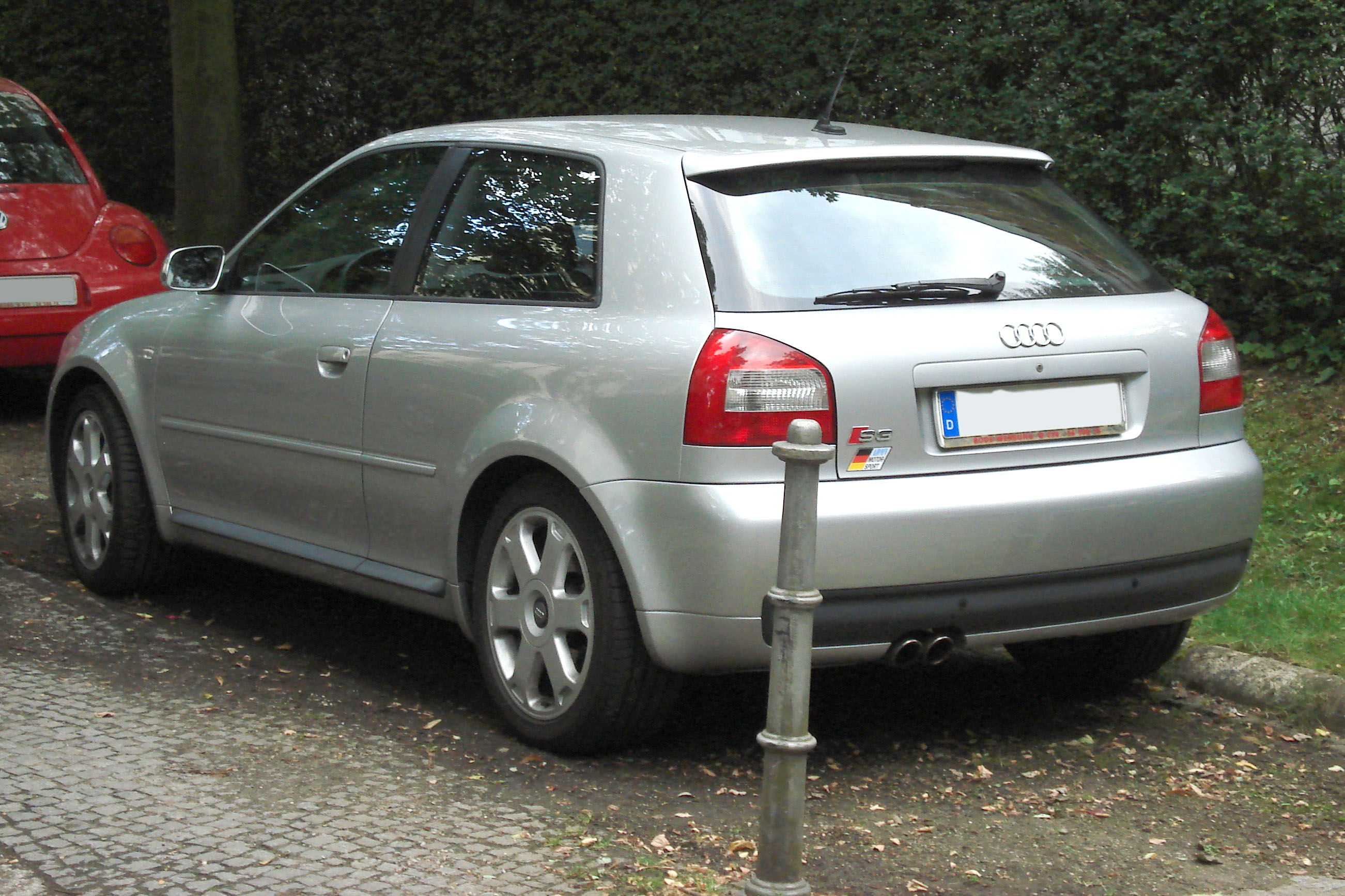 Audi S3 (8L)